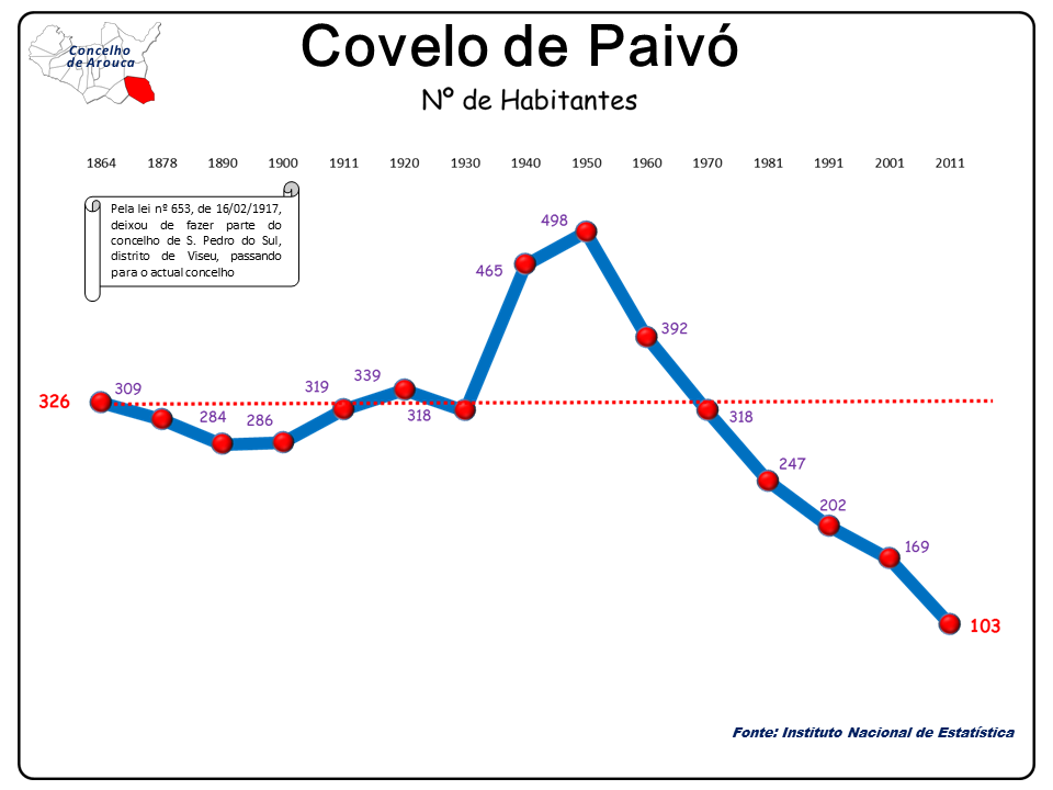 Freguesia